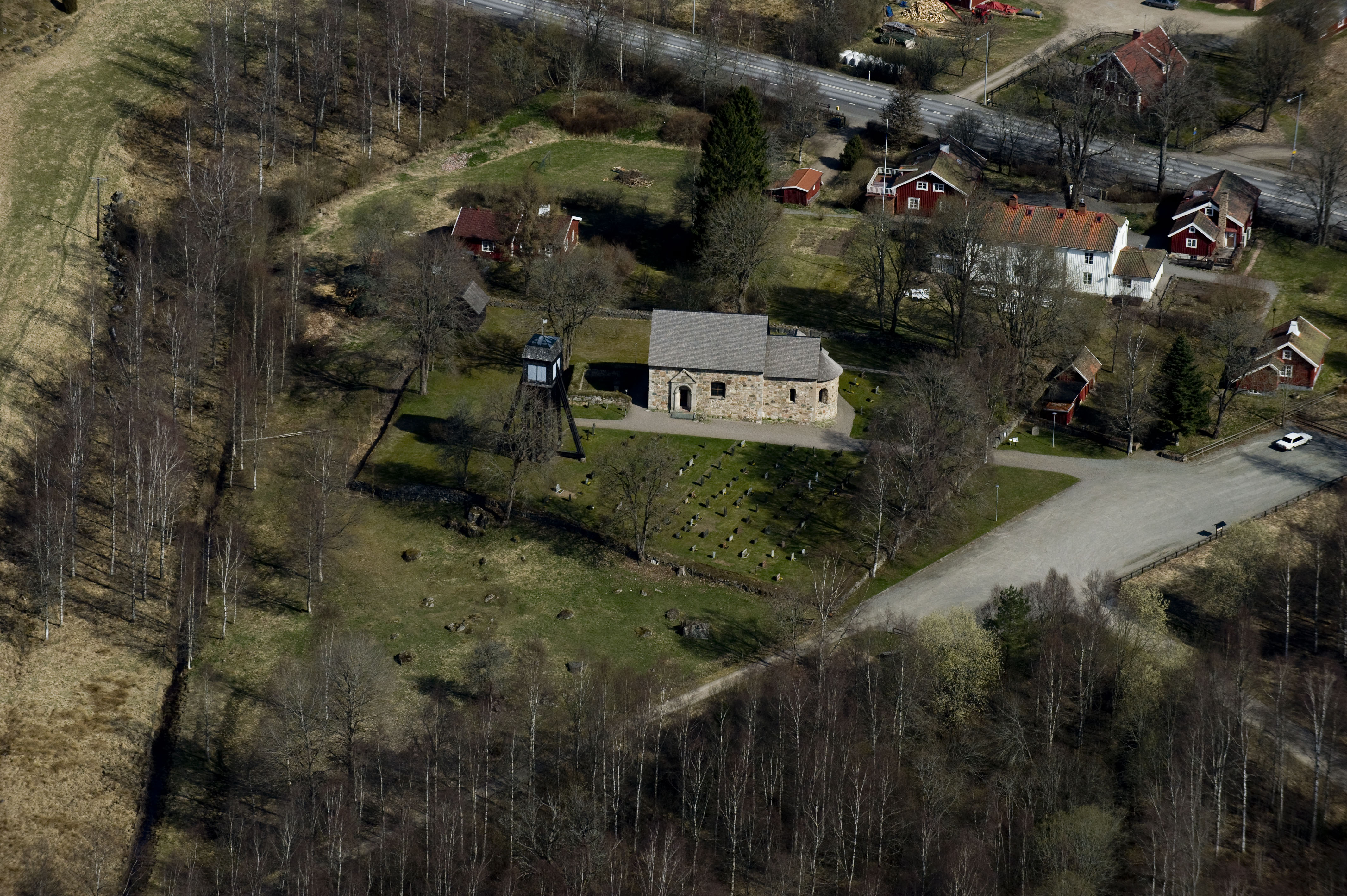 Gamla Hjälmseryds kyrka. Riksväg 30 passerar.